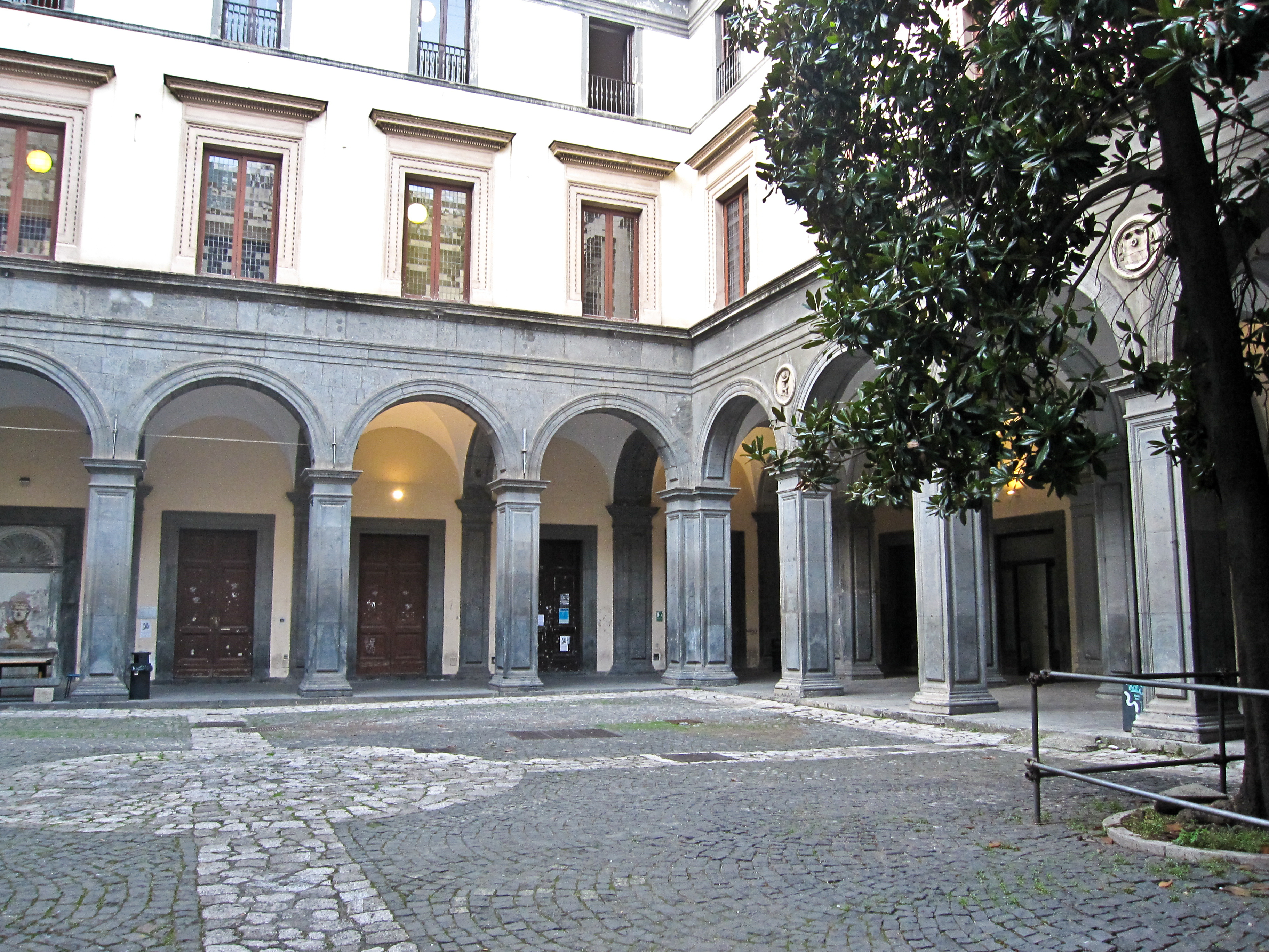 Cortile interno del Palazzo Orsini Gravina (Napoli).